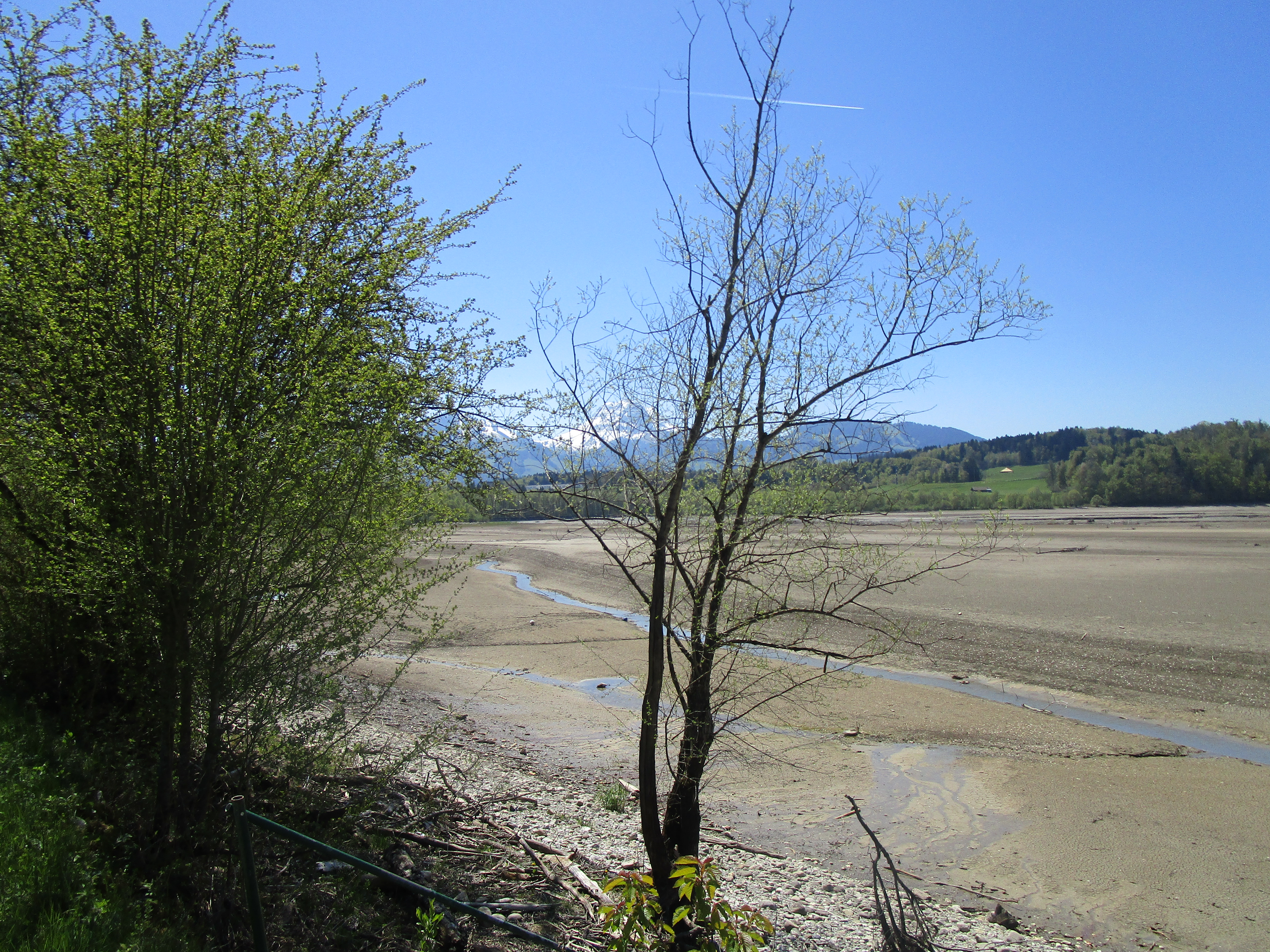 Lac de la Gruyère, vue depuis le début du sentier pédestre au petit village de Botterens